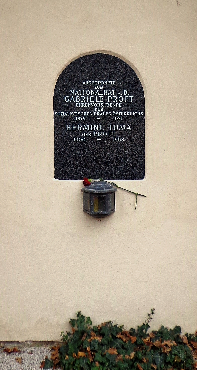 Feuerhalle Simmering - Abteilung ML (Umfassungsmauer): Urnengrab von Gabriele Proft